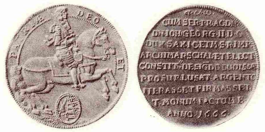 Kurfürstentum Sachsen, Halber Schautaler 1666, auf die Münzstätte Bautzen